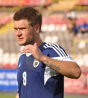 Кирило Петров — український футболіст під час виступів за "Говерлу"